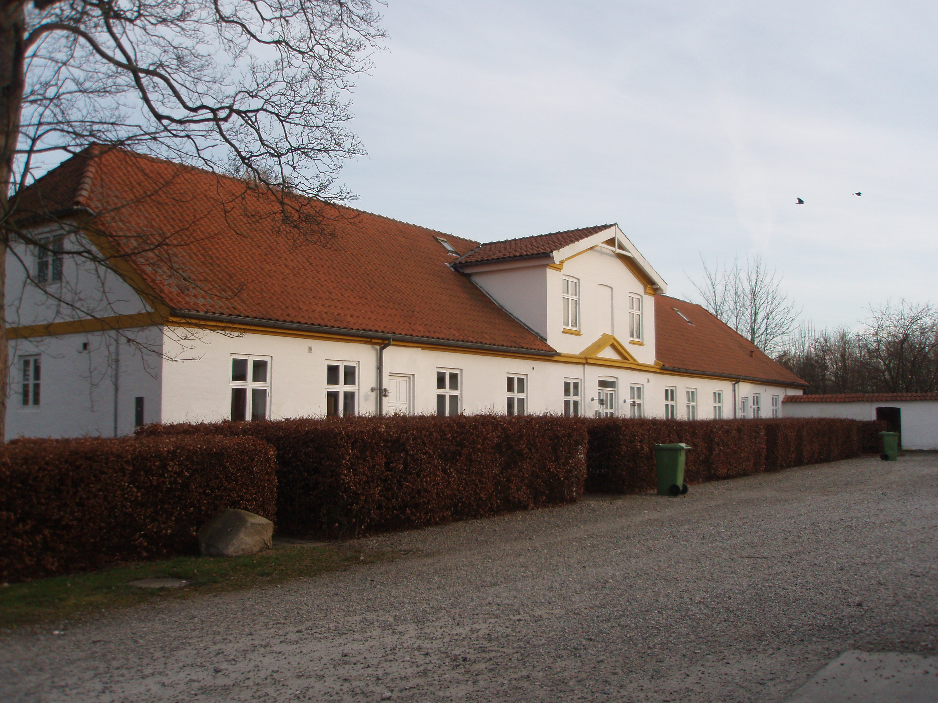 Koldkærgård marts 2009